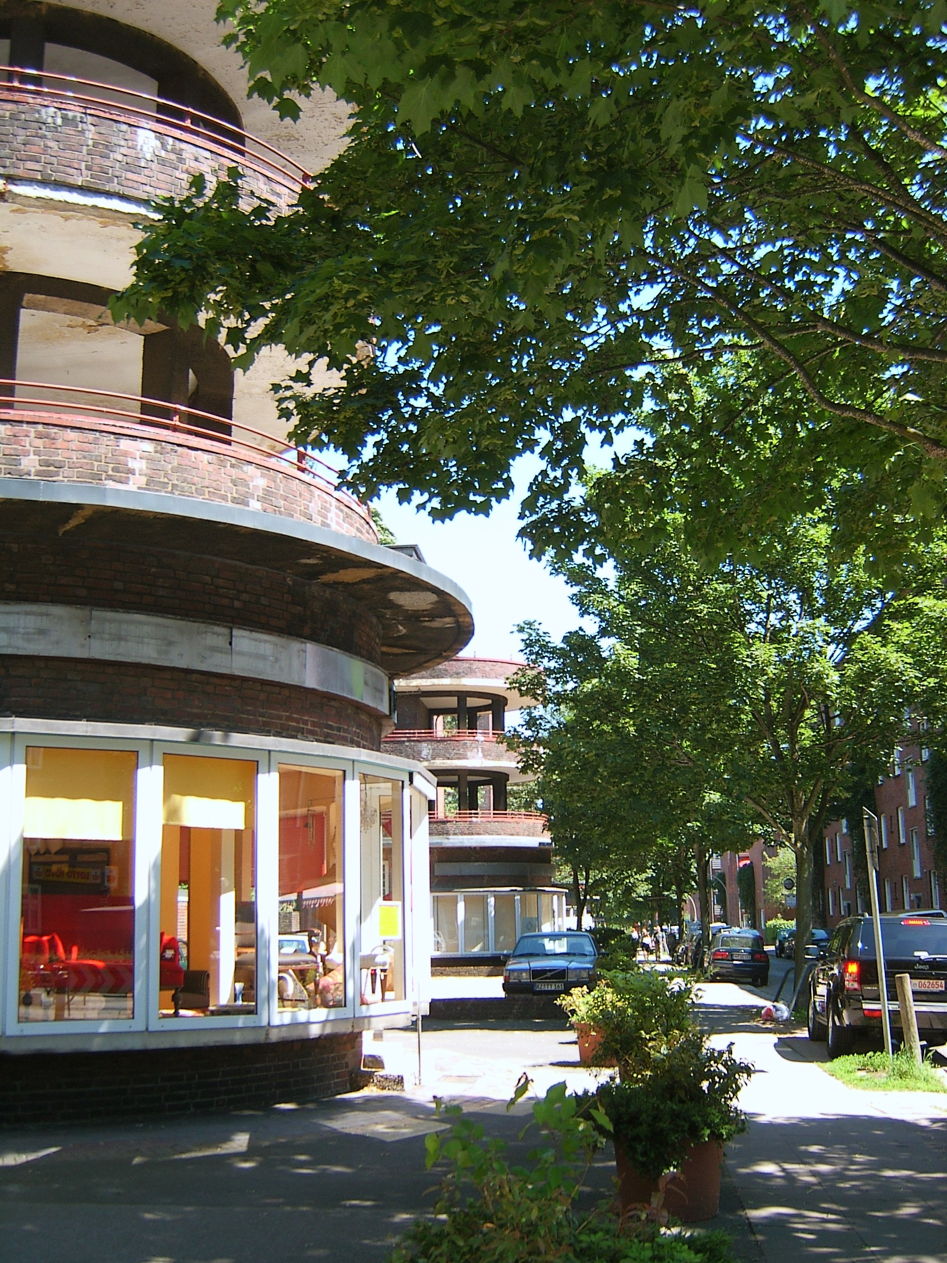 Hamburg, Dulsberg, Laubengänge